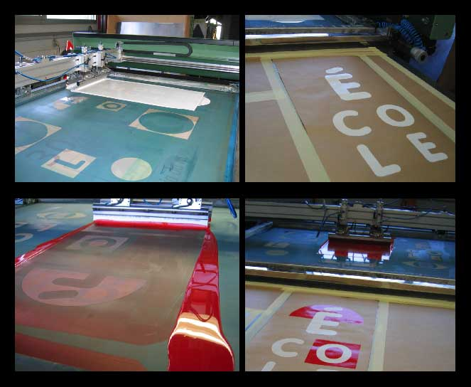 Druckvorgang Siebdruck